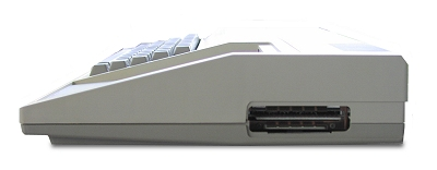 Foto eines Texas Instruments TI-99/4A (beige Version, rechts)